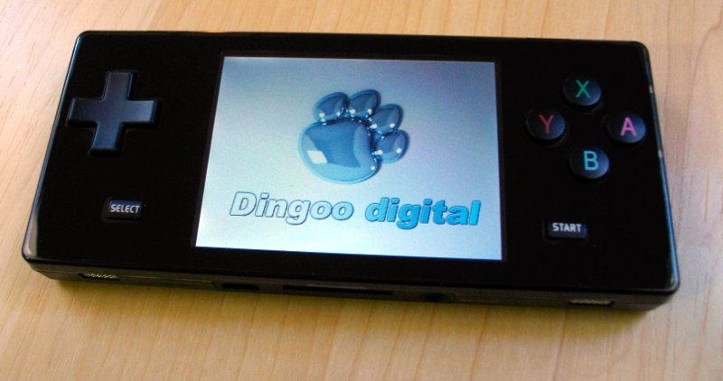 Dingoo Black